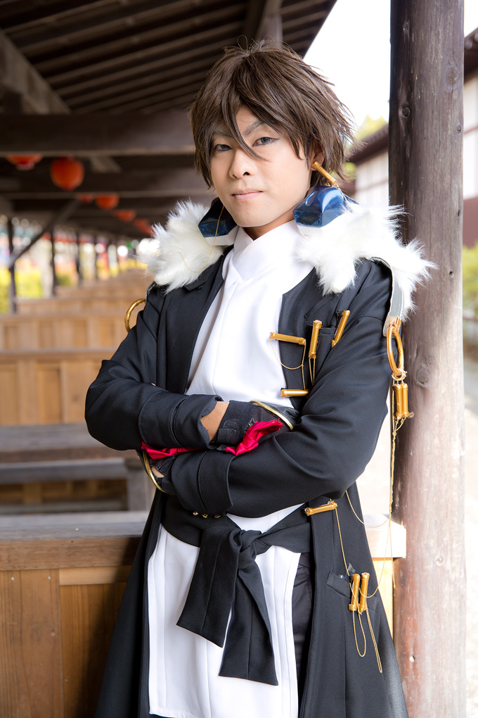 Cosplay de Aoi Toori personaje principal masculino de Kyōkai Senjō no Horizon en Japón.